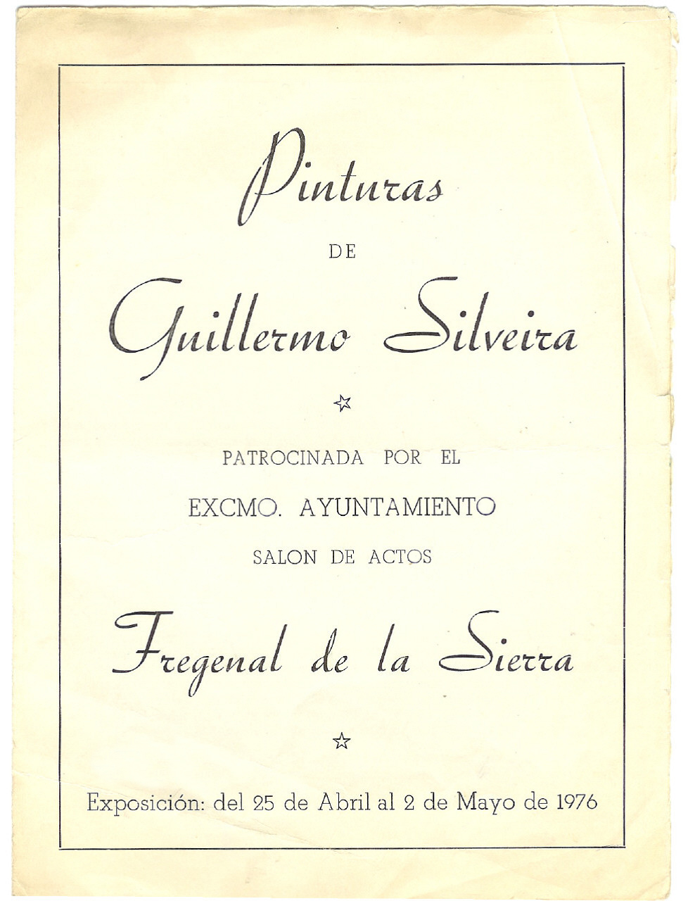 Díptico de la exposición "Pinturas de Guillermo Silveira". Salón de actos del Ayuntamiento de Fregenal de la Sierra (Badajoz), 25 de abril-2 de mayo de 1976. Imp. Ángel Verde. Guillermo Silveira García (1922–1987) Description painter, sculptor, military personnel and art educatorDate of birth/death 11 January 1922 11 May 1987Location of birth/death Segura de León BadajozWork periodcirca 1945-1987Work location BadajozAuthority control : Q5888937 VIAF: 100940319 ISNI: 0000 0000 7827 0108 GND: 139488154 BNE: XX4841676 creator QS:P170,Q5888937